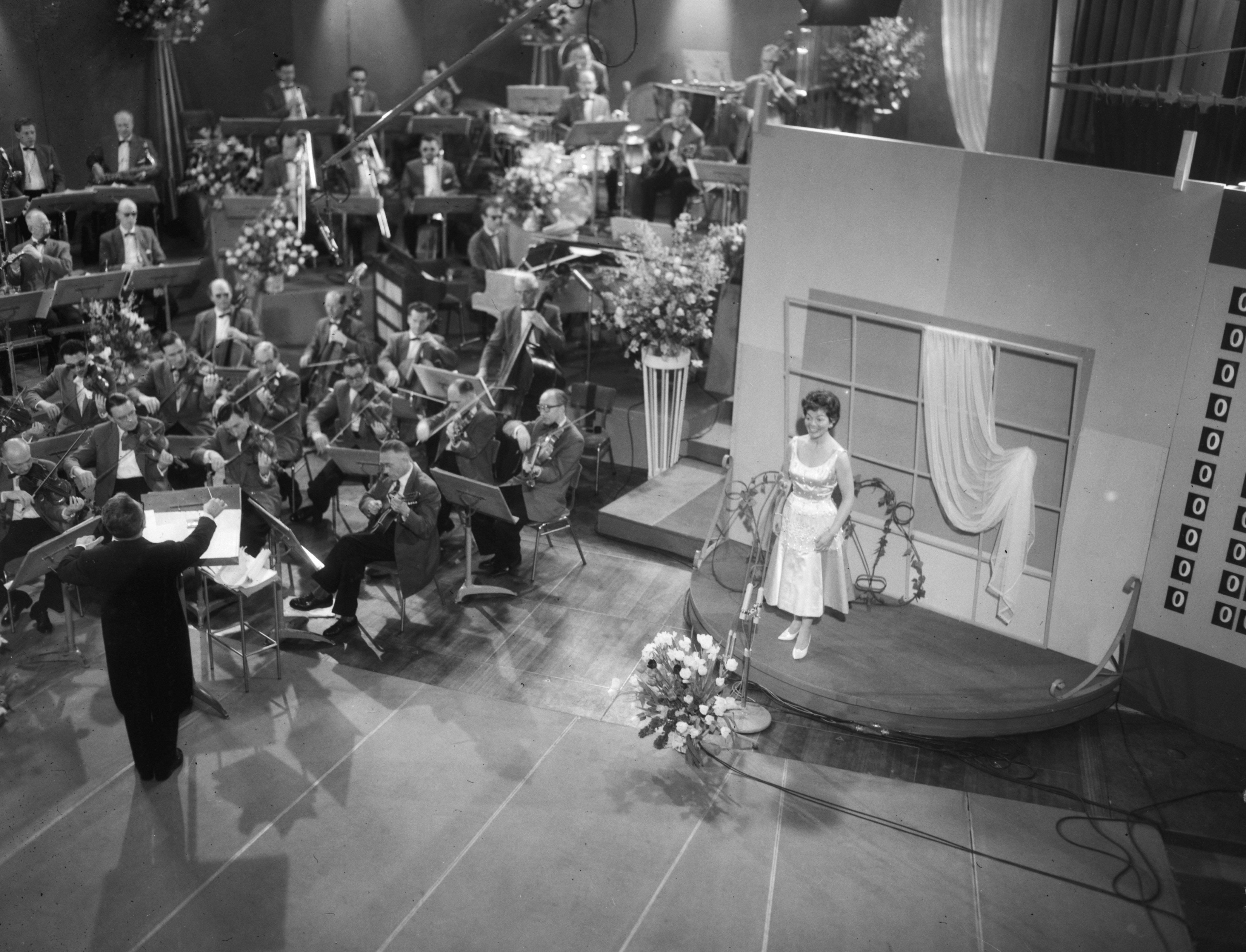 Collectie / Archief : Fotocollectie Anefo Reportage / Serie : [ onbekend ] Beschrijving : Eurovisie Songfestival. Lys Assia (Zwitserland) Datum : 11 maart 1958 Locatie : Hilversum Trefwoorden : songfestivals, zangeressen Persoonsnaam : Assia Lys Fotograaf : Pot, Harry / Anefo Auteursrechthebbende : Nationaal Archief Materiaalsoort : Negatief (zwart/wit) Nummer archiefinventaris : bekijk toegang 2.24.01.04 Bestanddeelnummer : 909-4008